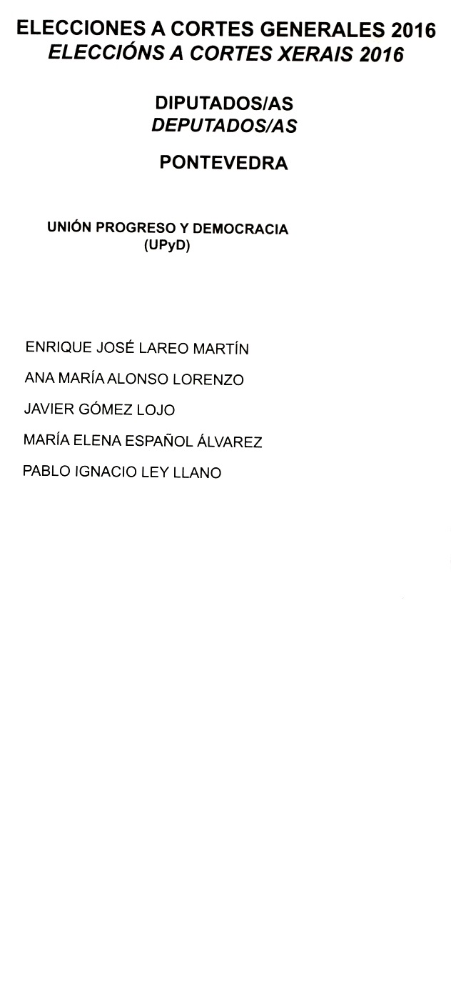 Papeletas electorales de las Elecciones a Cortes Generales de España de 2016, Provincia de Pontevedra.